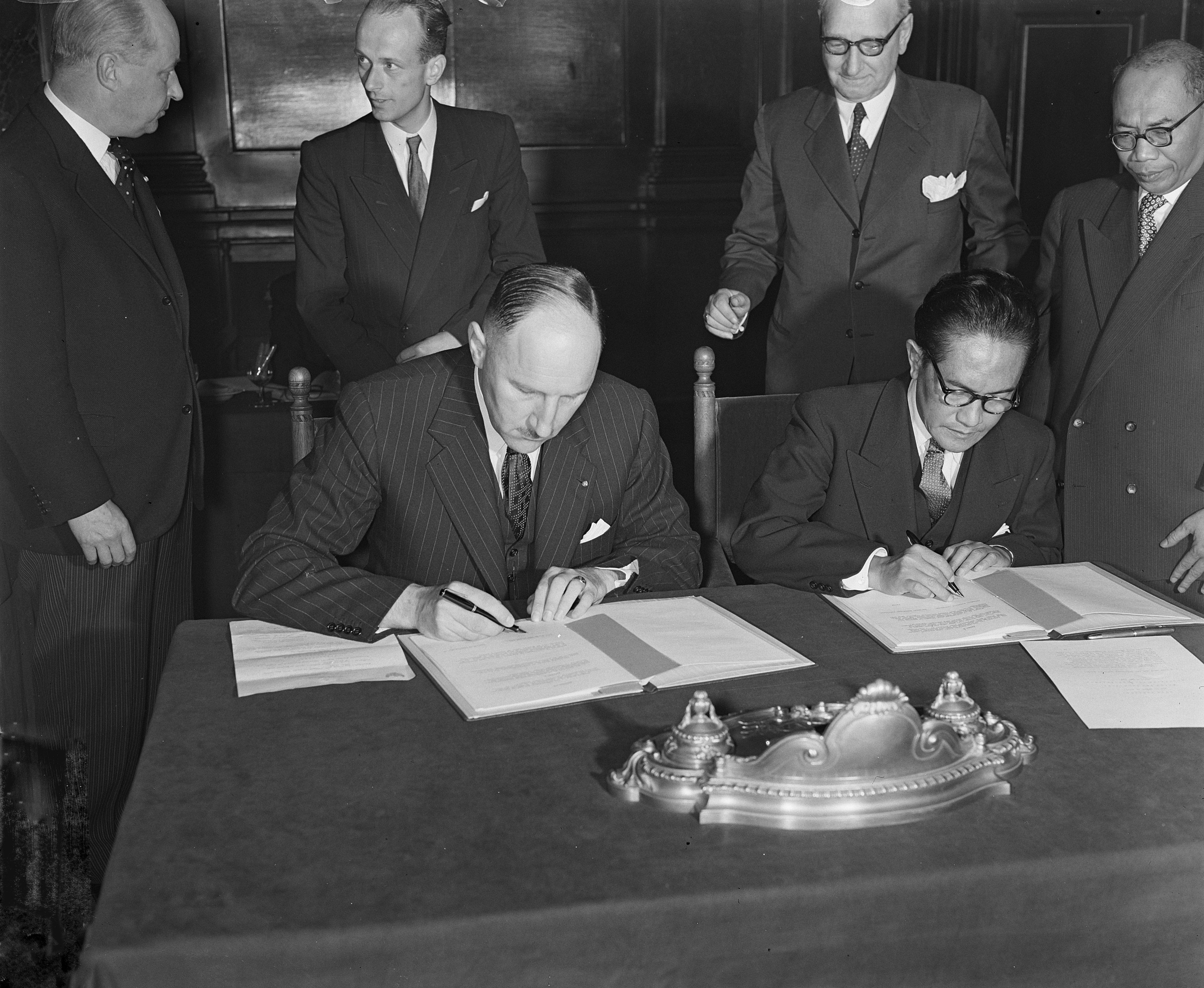 Collectie / Archief : Fotocollectie Anefo Reportage / Serie : [ onbekend ] Beschrijving : De minister van Buitenlandse Zaken, Joseph Luns, en zijn Indonesische ambtgenoot Sunarjo ondertekenen in de Lairessezaal van het Binnenhof het akkoord waarmee een einde komt aan de Unie, en daarmee aan de speciale band tussen Nederland en Indonesië Datum : 10 augustus 1954 Locatie : Den Haag, Indonesië, Indonesië Trefwoorden : ministers, ondertekeningen, verdragen Persoonsnaam : Luns, J.A.M.H., Luns, Joseph Fotograaf : Rossem, Wim van / Anefo Auteursrechthebbende : Nationaal Archief Materiaalsoort : Glasnegatief Nummer archiefinventaris : bekijk toegang 2.24.01.09 Bestanddeelnummer : 906-6572